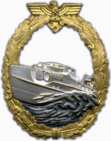 German e-boat war badge from the third reich (Schnellbootkriegsabzeichen)